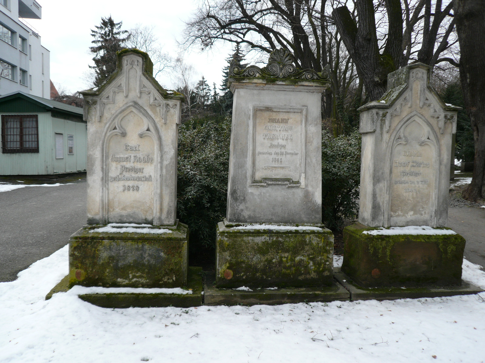 Gaistor-Friedhof zu Preßburg (Bratislava)